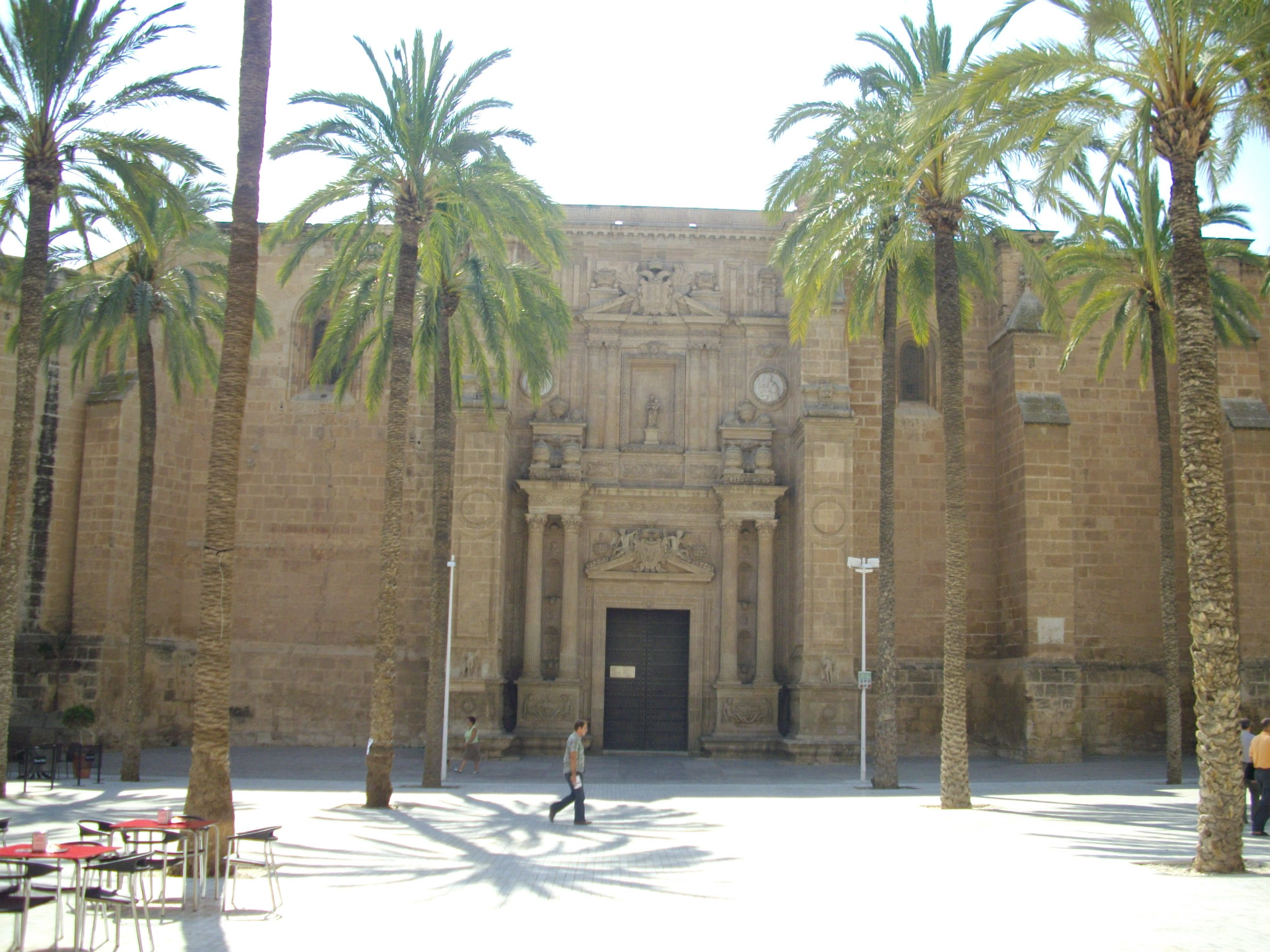 vue de la cathédrale d'Alméria